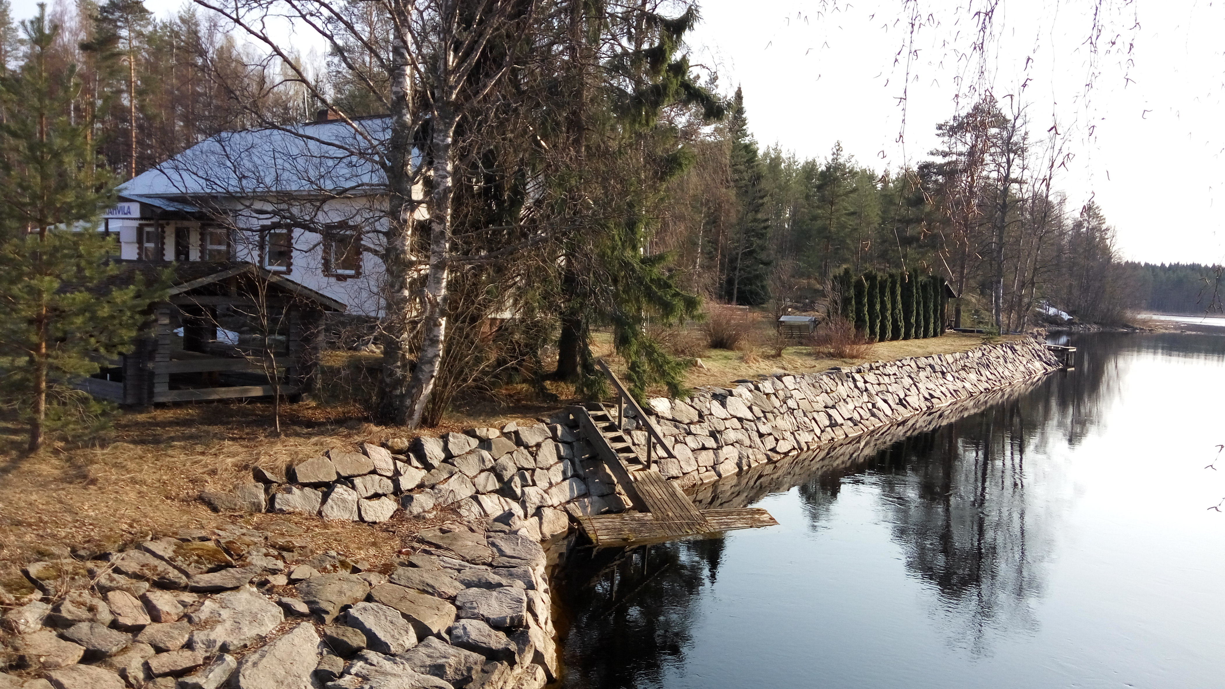 Vuonna 2008 rekonstruoitu Telataipaleen kanava (Sulkava). Kanavalla käytettiin kylmämuuritekniikkaa.